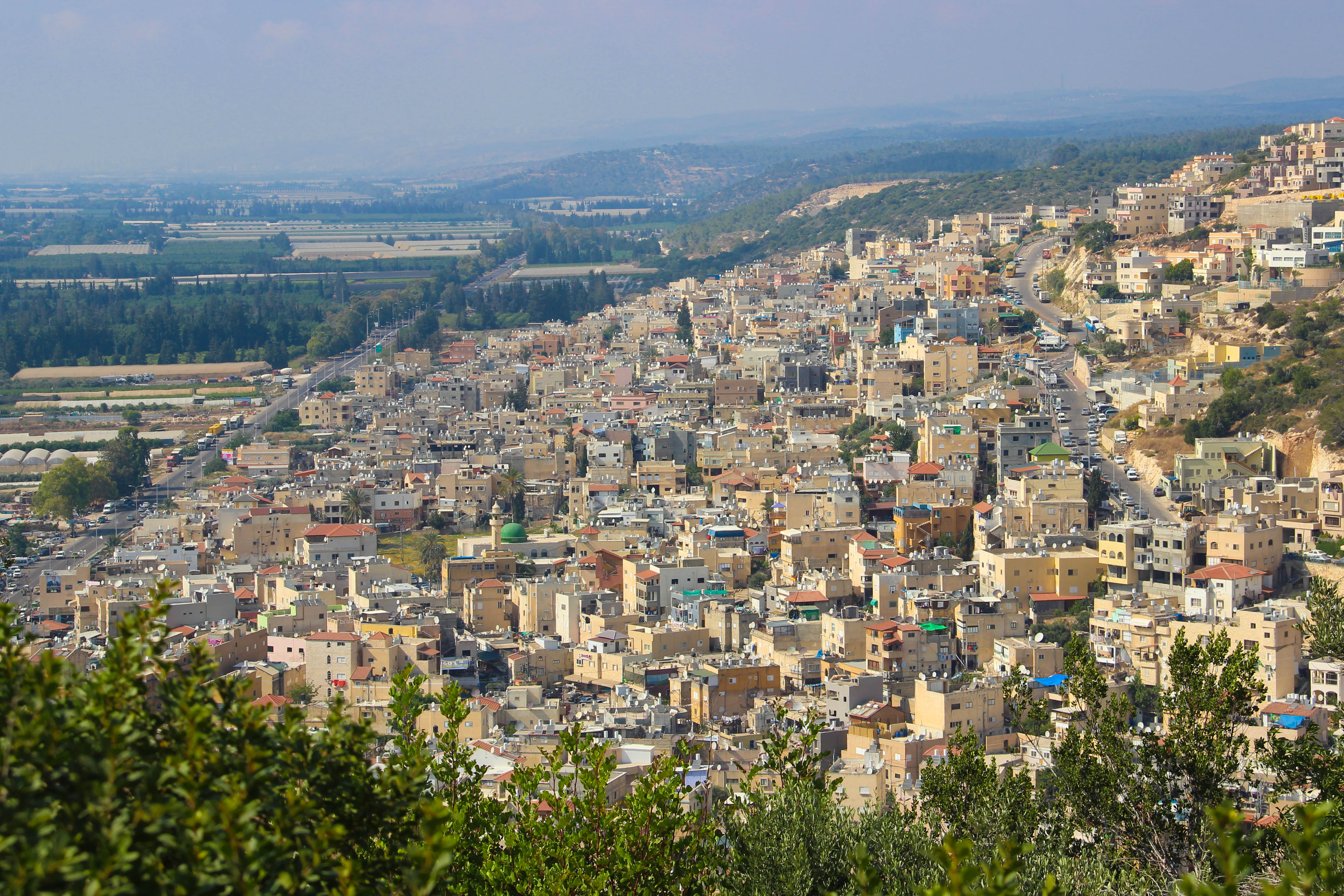 قرية الفراديس - فلسطين48